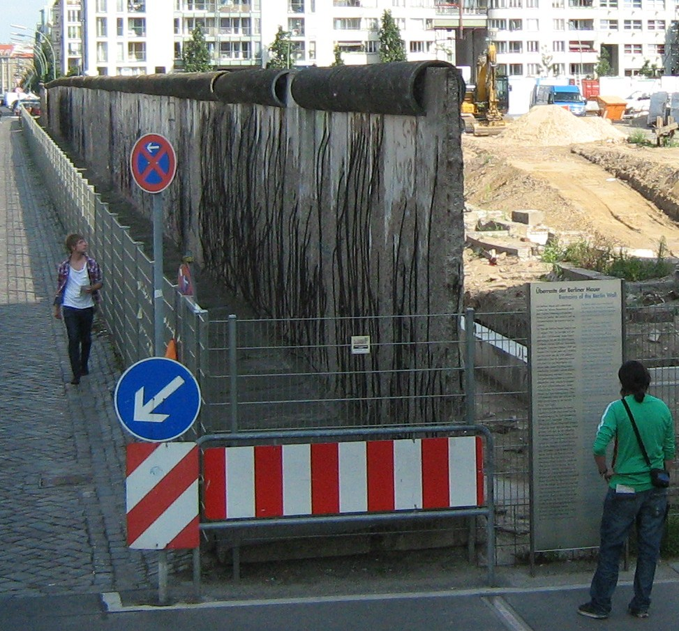 Berliner Mauerrest an der Niederkirchnerstraße 2009